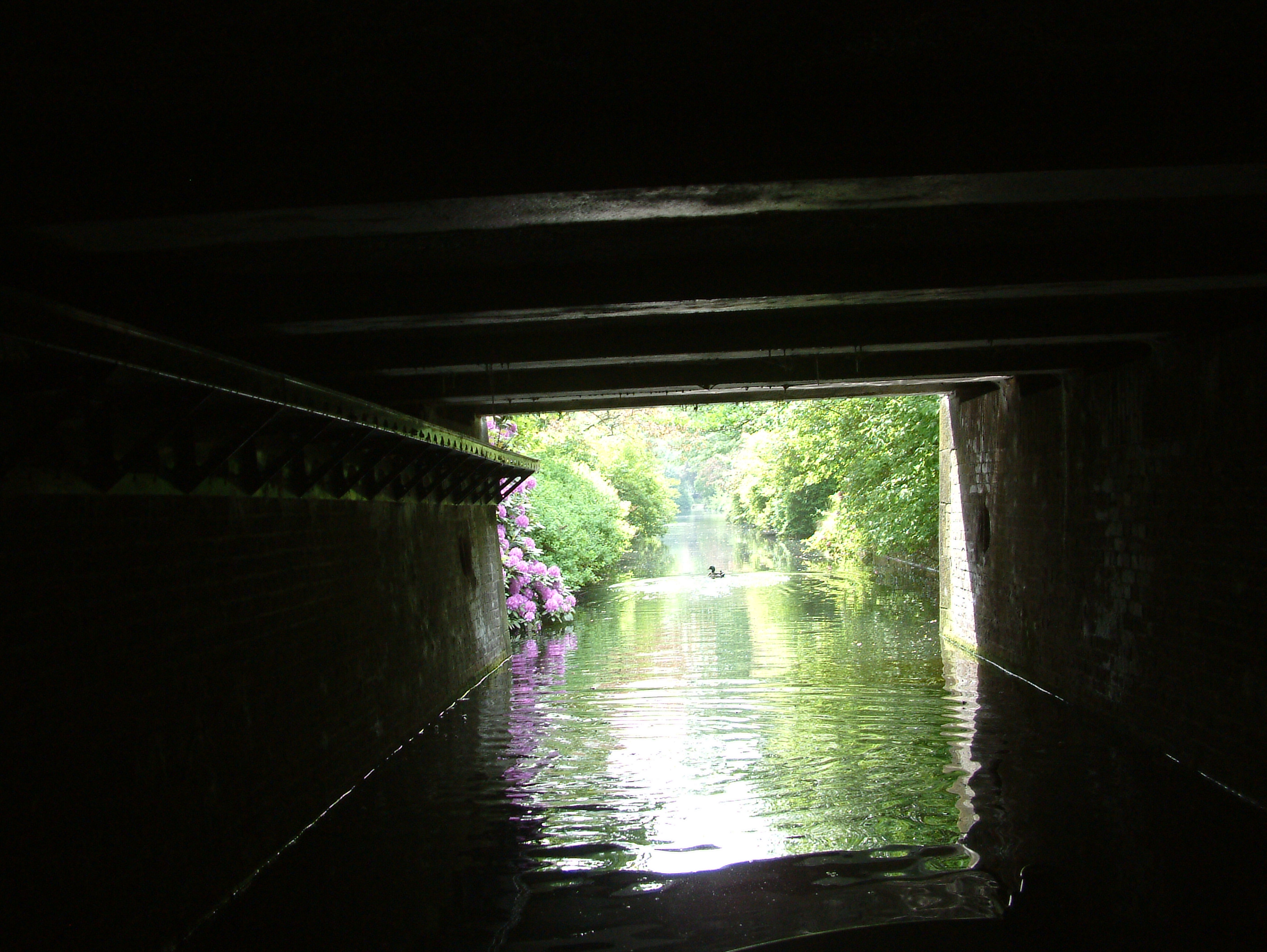 Bridges in The Hague as mentioned in the filename.